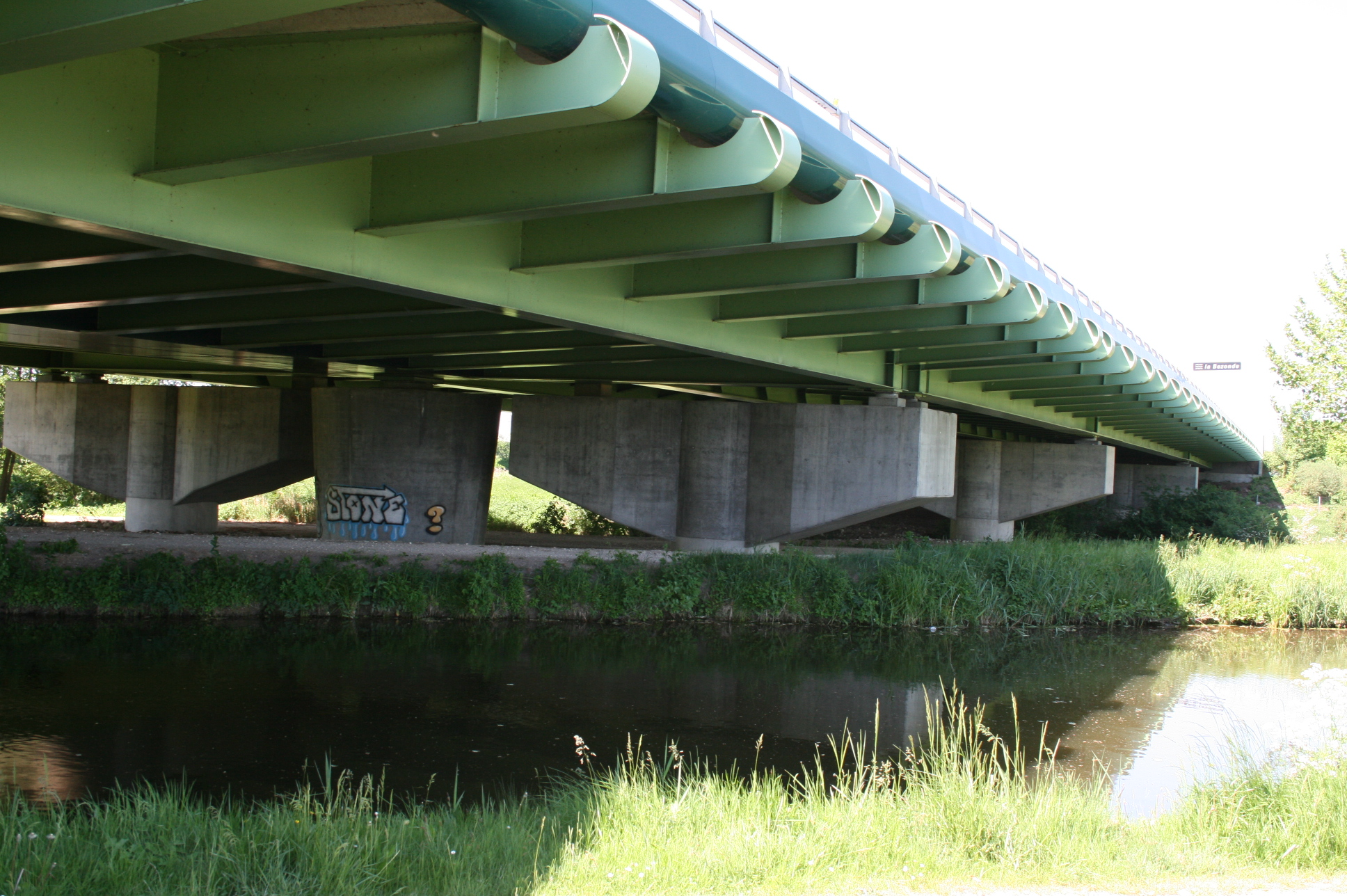 Viaduc de Pannes – pont en arc bowstring et ouvrage d’accès en bipoutre métallique. Franchit le Canal d’Orléans et la Bézonde – Département du Loiret (France)